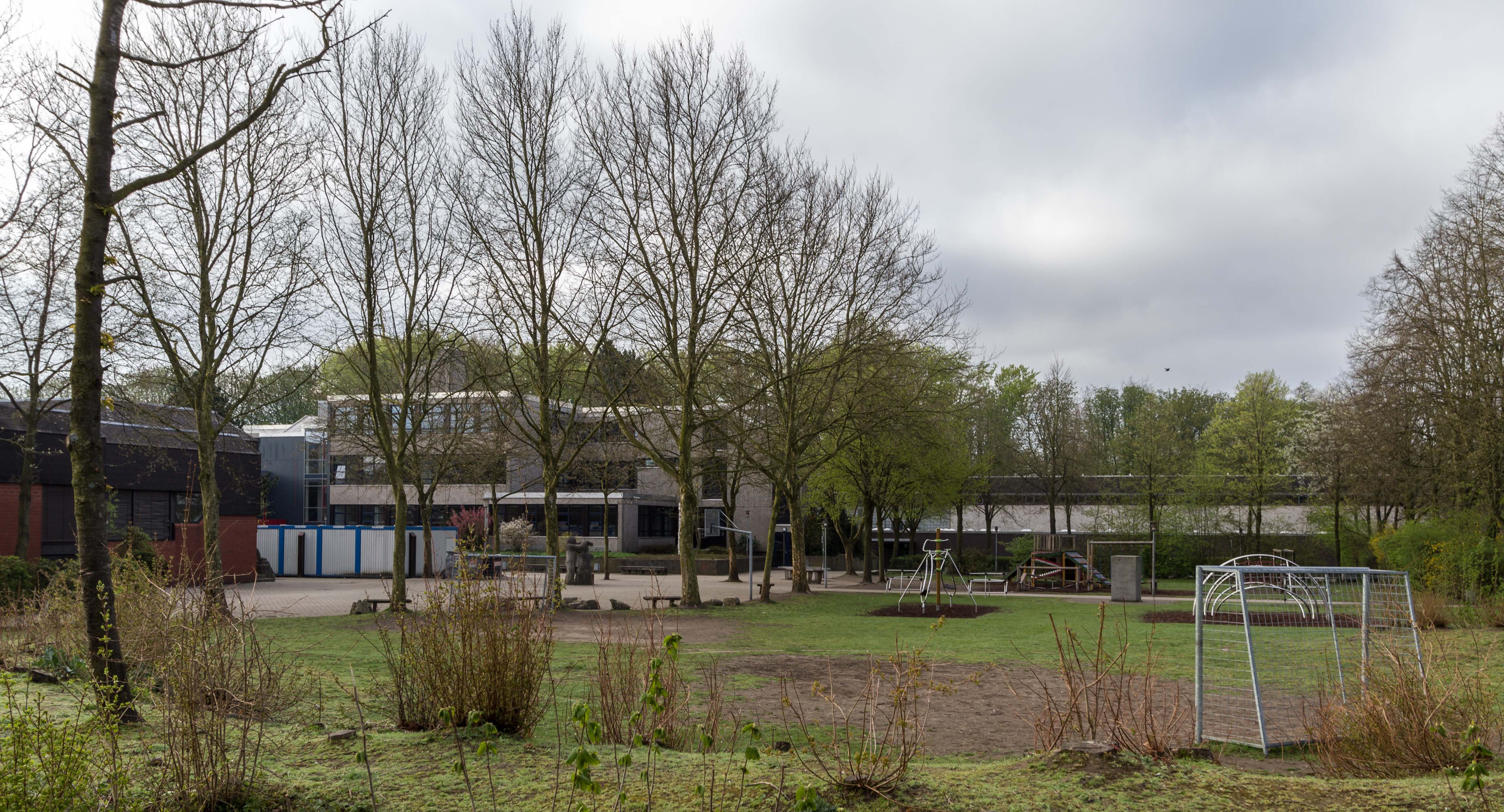 Clemens-Brentano-Gymnasium, Dülmen, Nordrhein-Westfalen, Deutschland